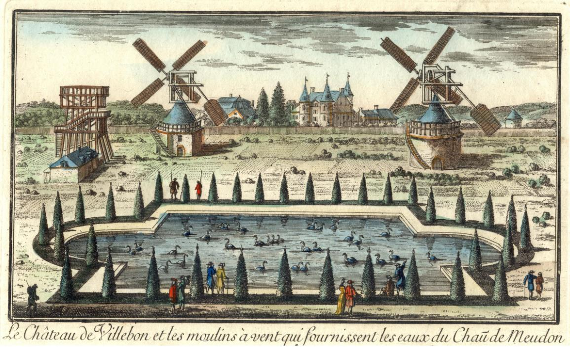 Les moulins de Villebon, sur les hauteurs de Meudon.